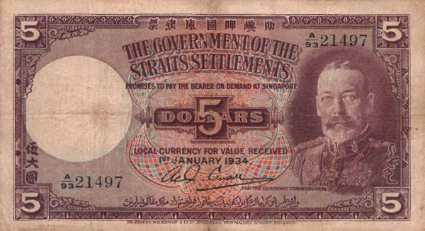 5 dólares